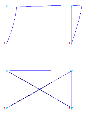 Plaatje van een stabiliteitsverband, getekend door Wikipediagebruiker: GeeKaa 30 aug 2005 11:39 (CEST)